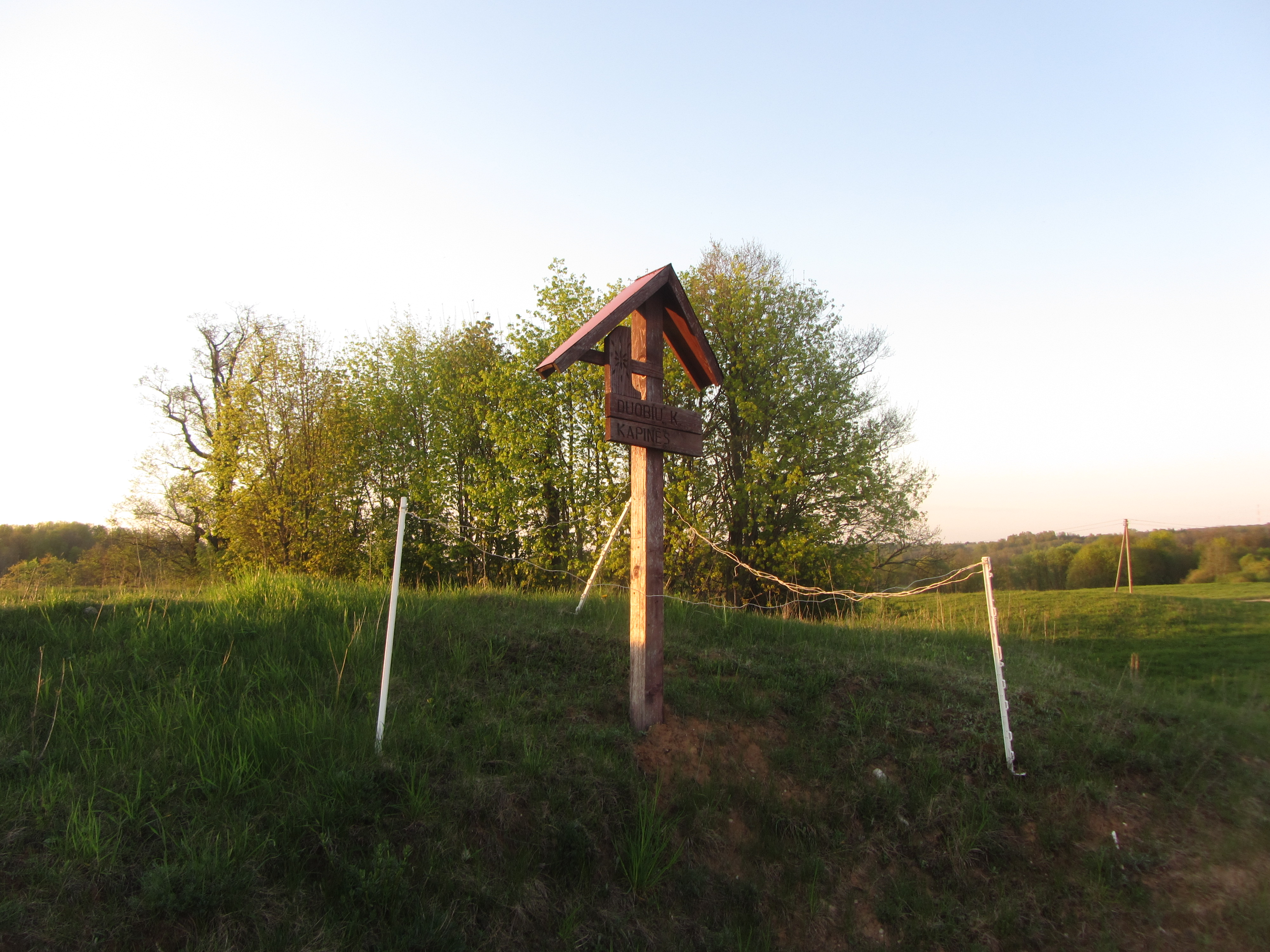 Daugailių sen., Lithuania